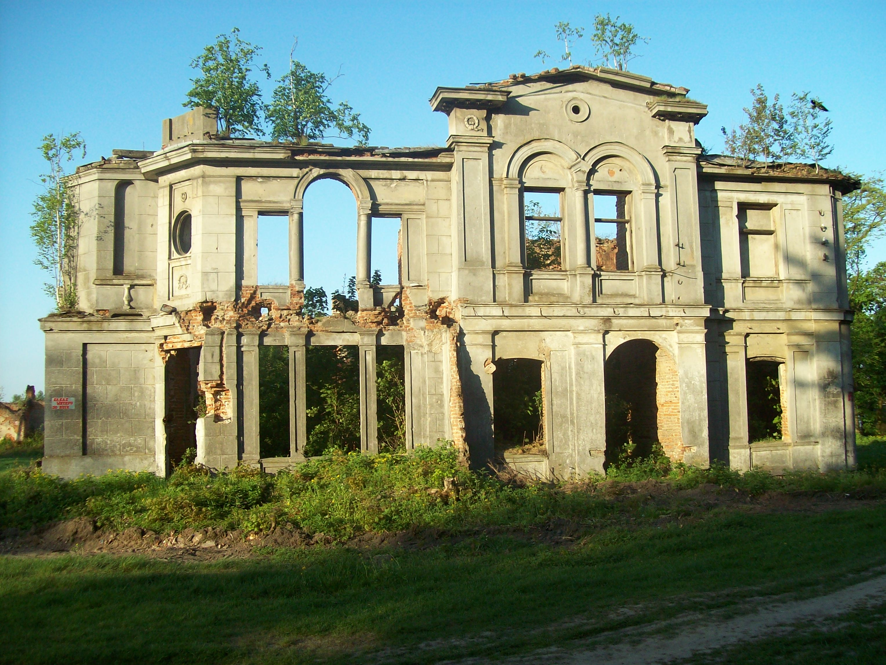 Ruiny pałacu Karskich we Włostowie